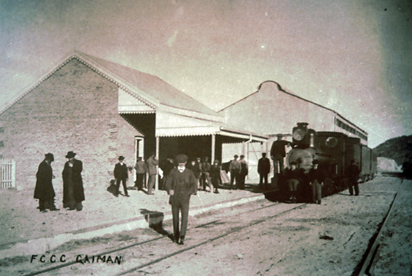 Esta foto, vista al oeste, muestra claramente la casa ferroviaria a la izquierda y el galpón de cargas detrás el tren. La locomotora es una de las 2-6-0/6 menos antigua, la Nº 4, 5 o 6. La rectitud de la línea junto a la plataforma sugiere que la foto fue tomada antes 1915, cuando la extensión a Dolavon necesitaba una desviación.